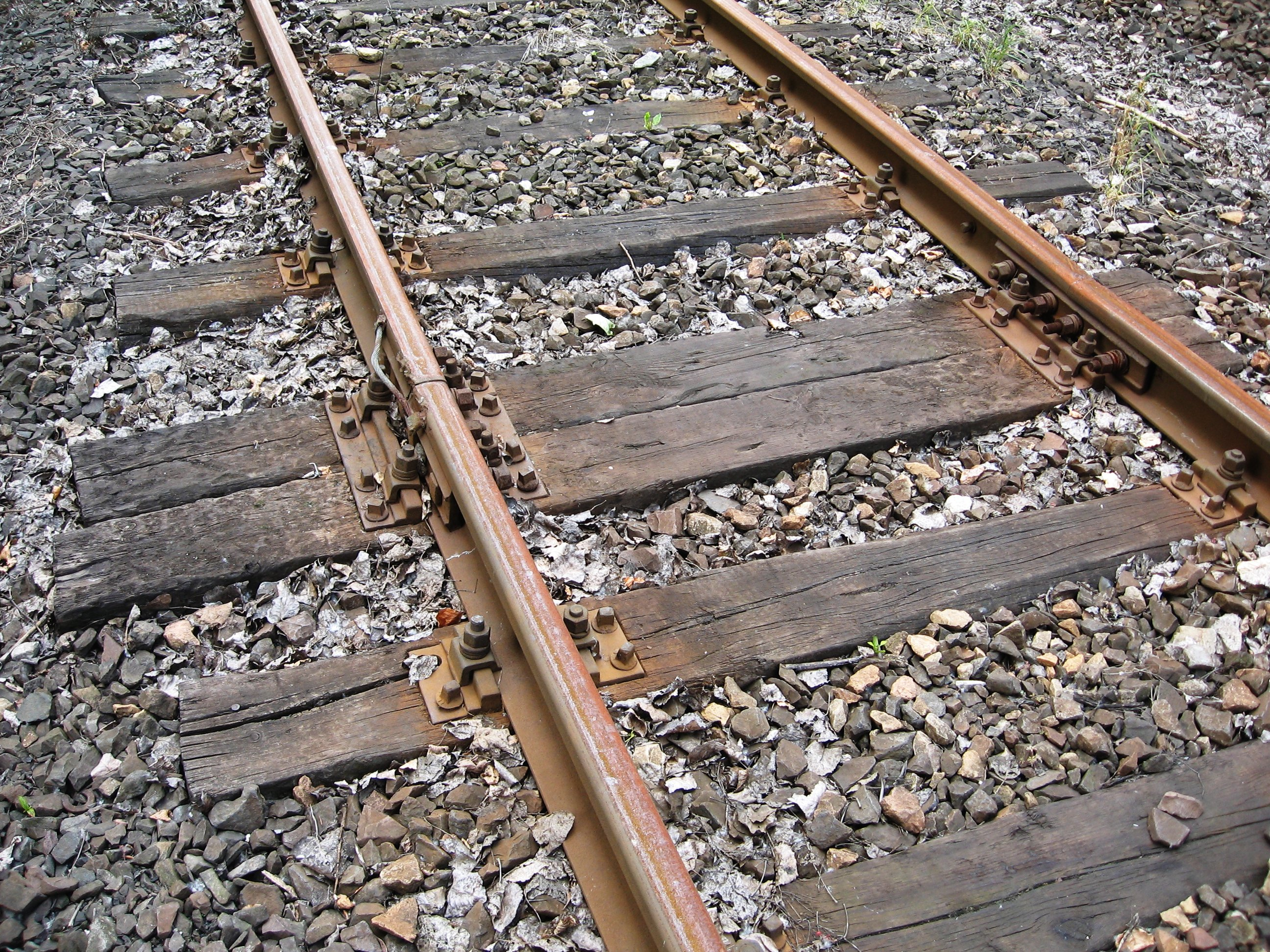 Dřevěné železniční pražce a koleje